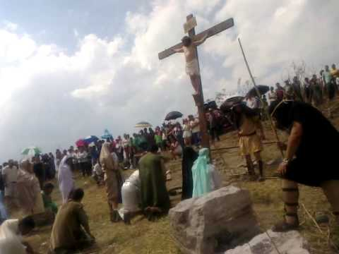 Crucificxión